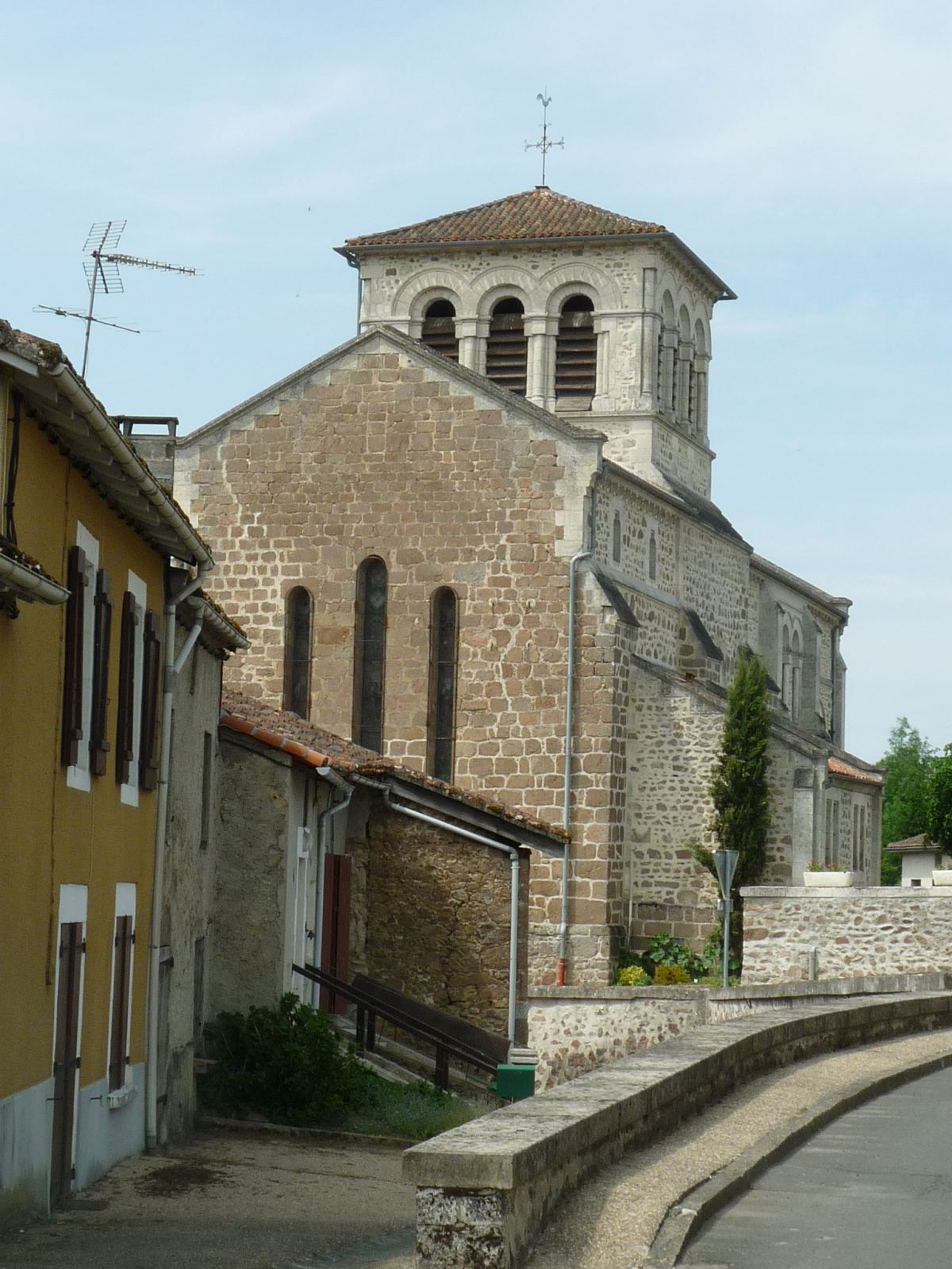 église de Chirac vue de l'est, Charente, France